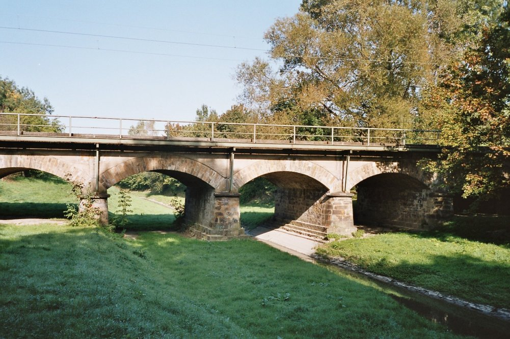 Die Sesekebrücke der Köln-Mindener Eisenbahn-Gesellschaft Benutzer:Markus Schweiß